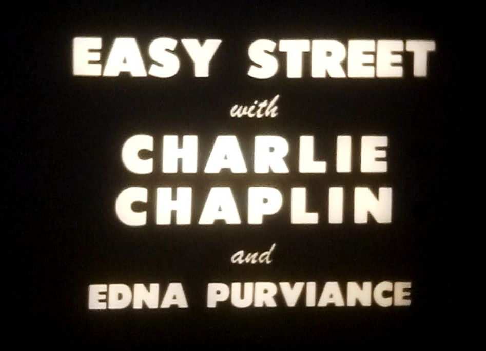 Förtext till Charlie Chaplins film "Easy Street"